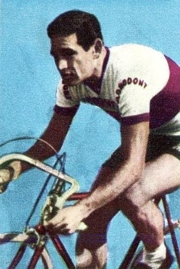 Gastone Nencini vers 1958